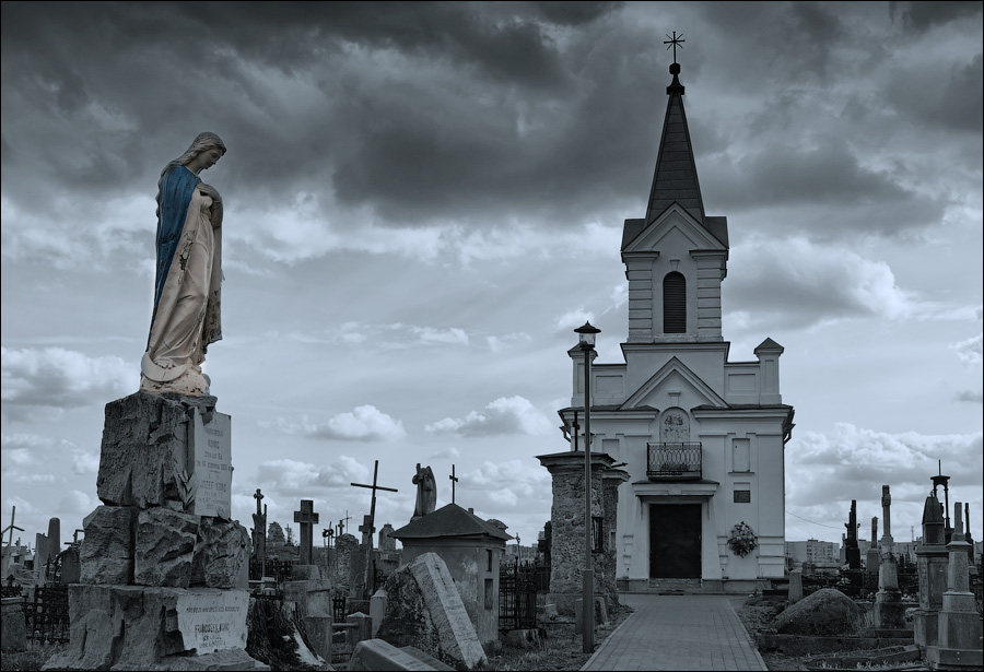 Гродзенскія замалёўкі